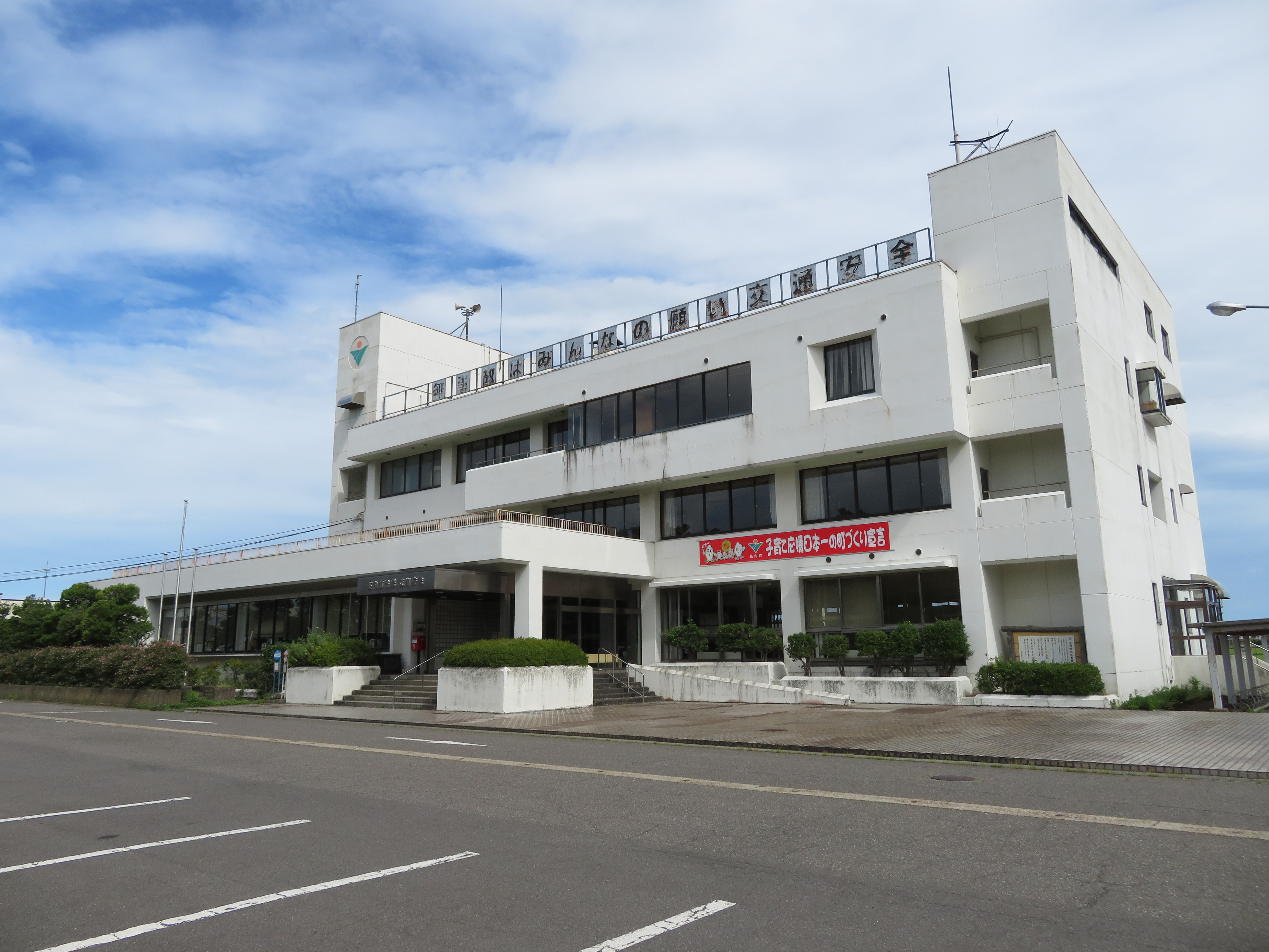 庄内町立川庁舎（旧立川町役場庁舎） Canon PowerShot SX720 HS